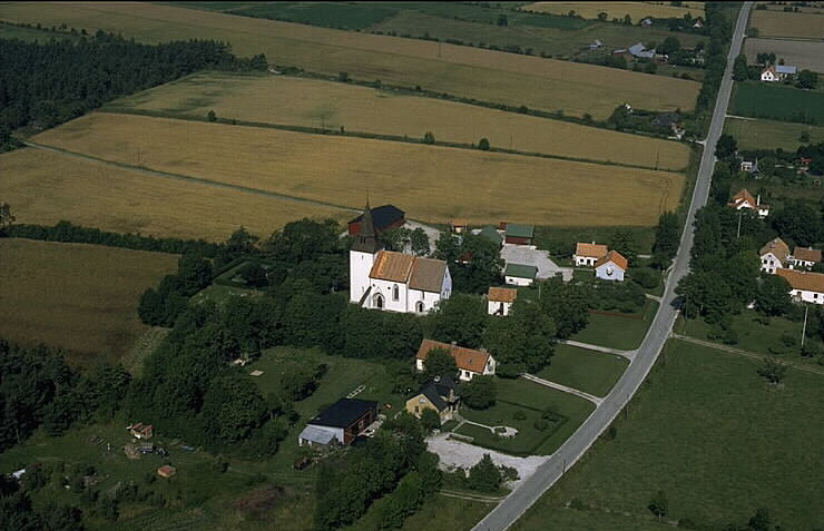 Motiv: Boge kyrka Nyckelord: Flygbilder, Riksintressen Kategori: KyrkbyBoge kyrka